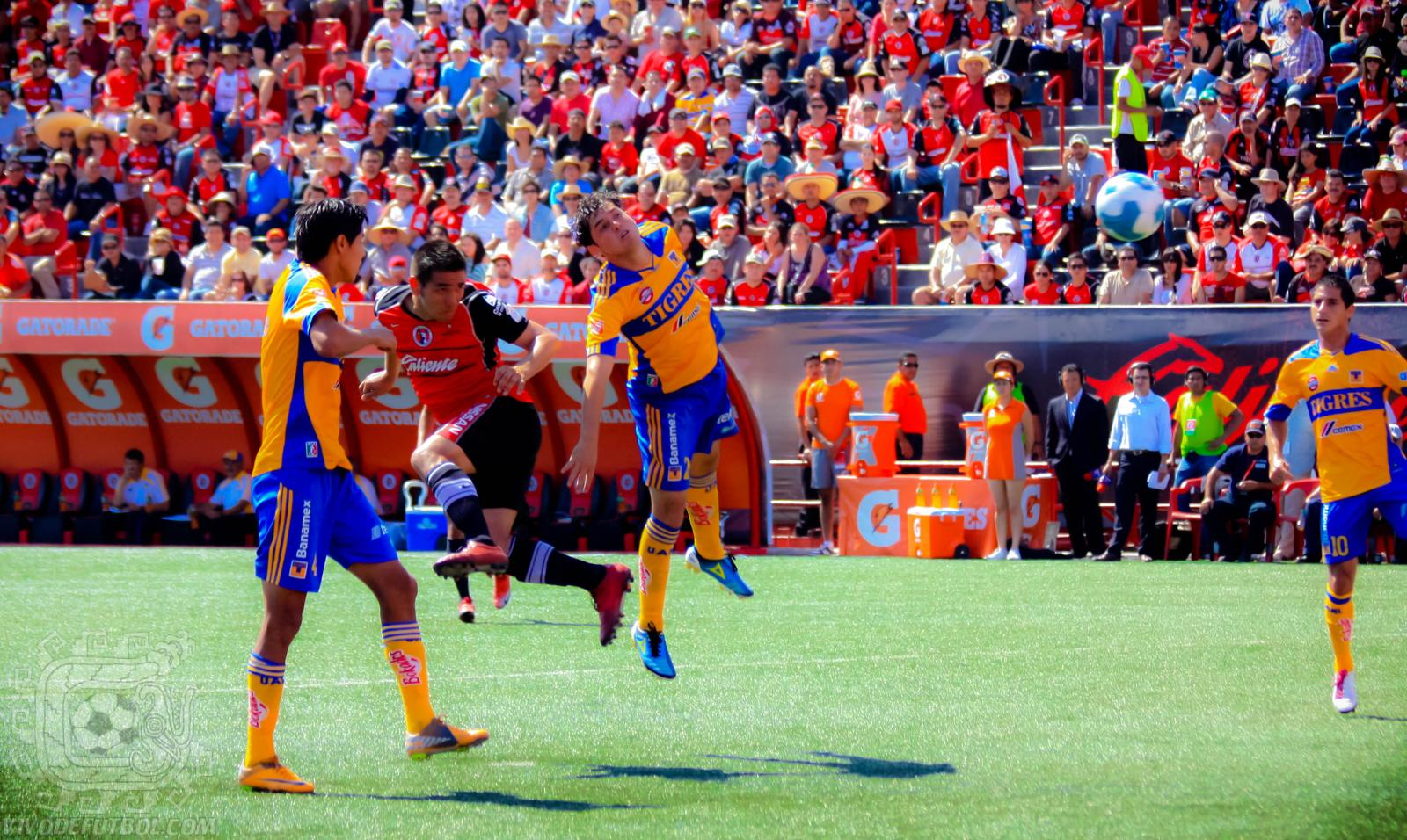 xolos vs tigres